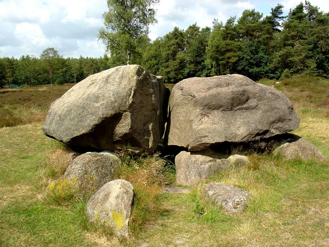 Hunebed D40 in het Valtherbosch bij Emmen